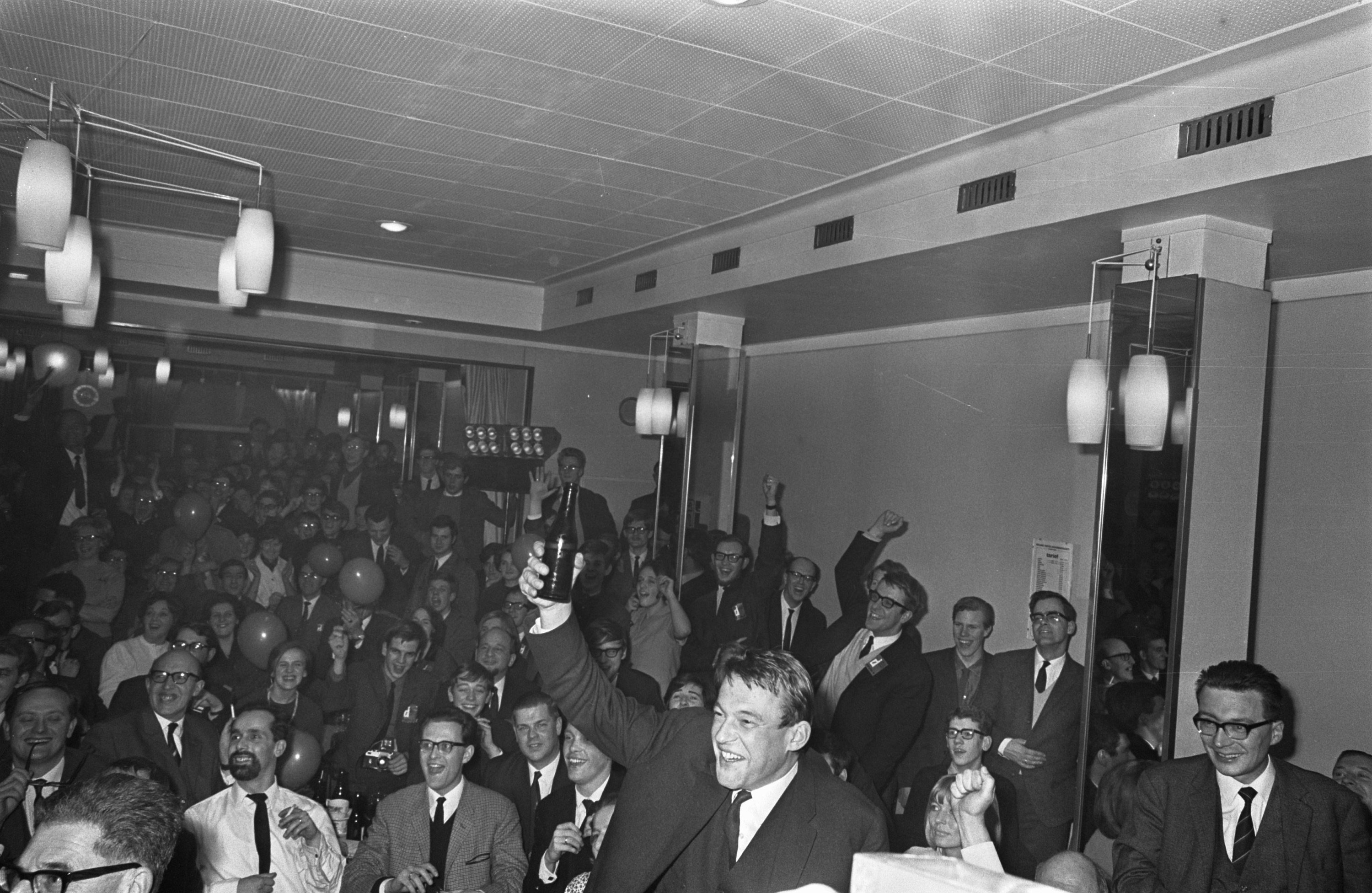 Hans van Mierlo, voorzitter en lijstaanvoerder van D66, blij met de verkiezingsuitslag. Van Mierlo heft juichend zijn arm met een flesje bier, in de overvolle Kleine Zaal van Hotel Krasnapolsky te Amsterdam, Nederland 15 februari 1967.